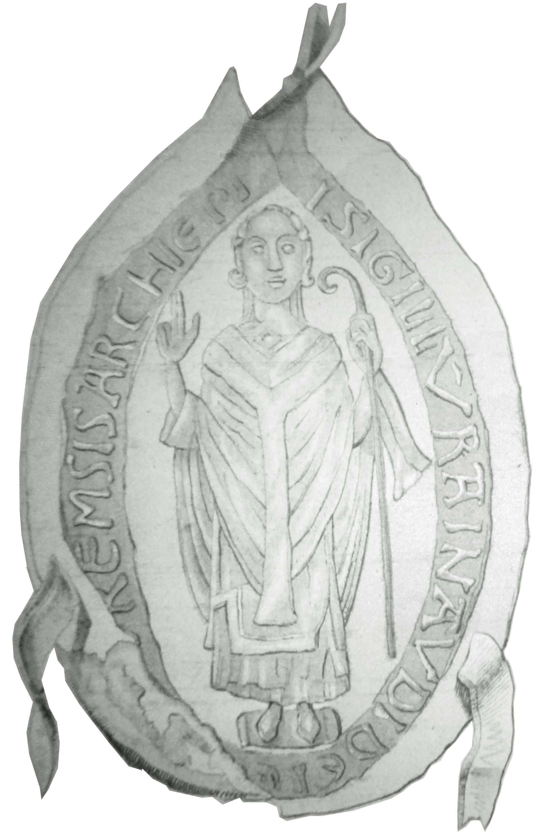 cf le titre.